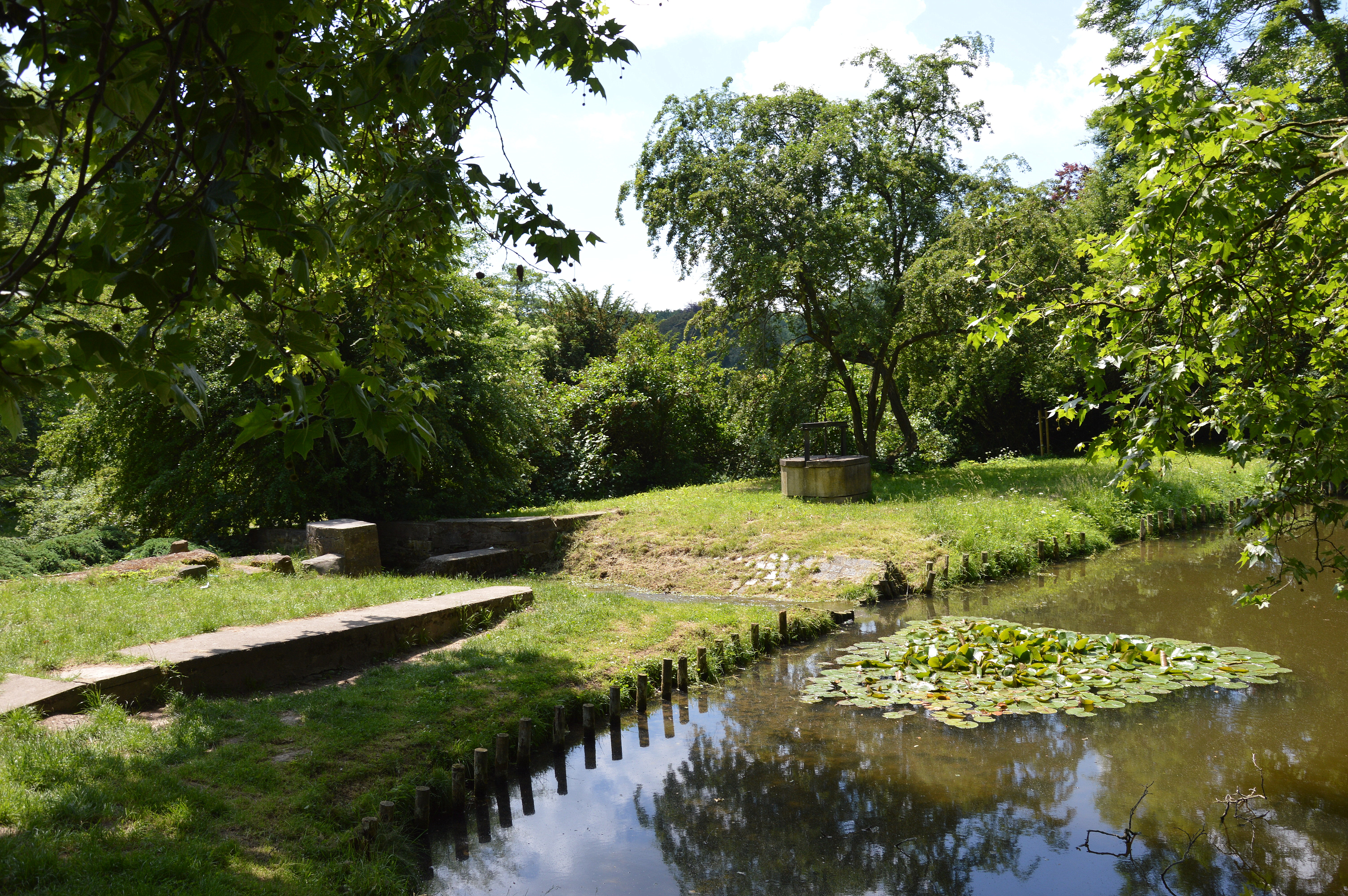 Teich an der Ölmühle in Althaldensleben